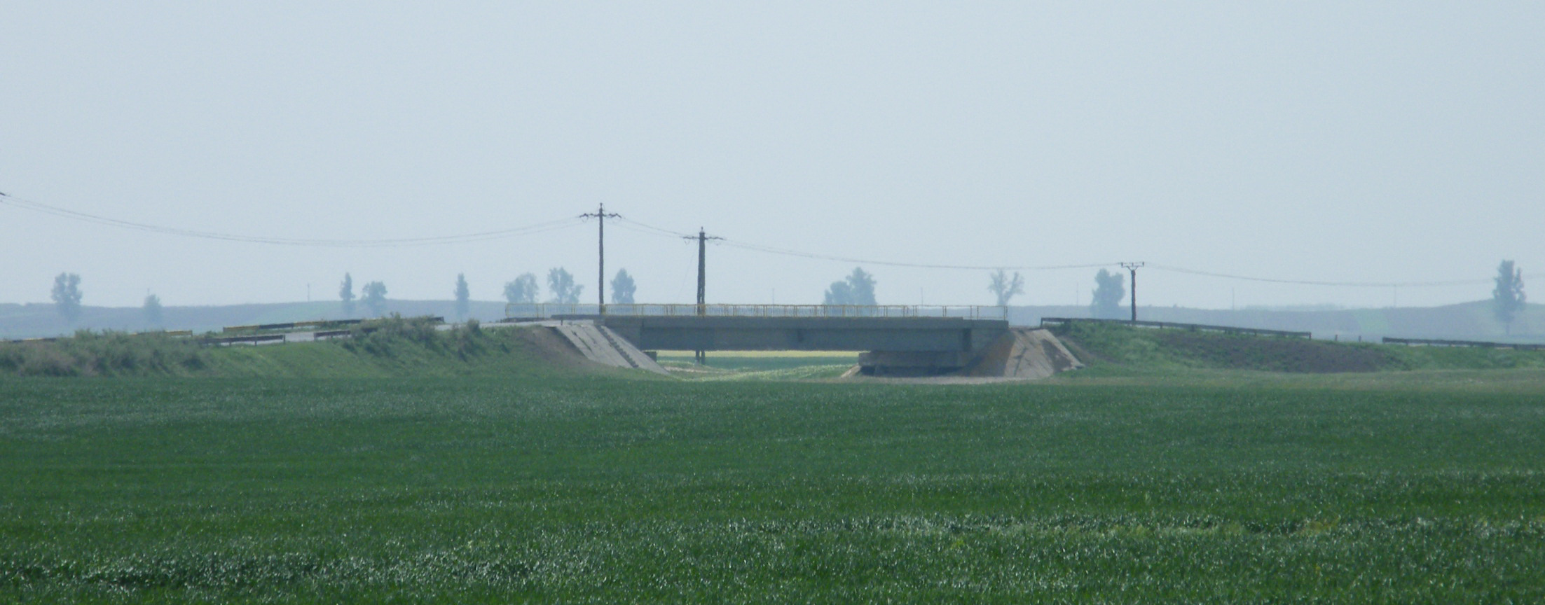 Pod rutier peste râul Călmăţui la Filiu comuna Bordei Verde Restricţii - fără restricţii